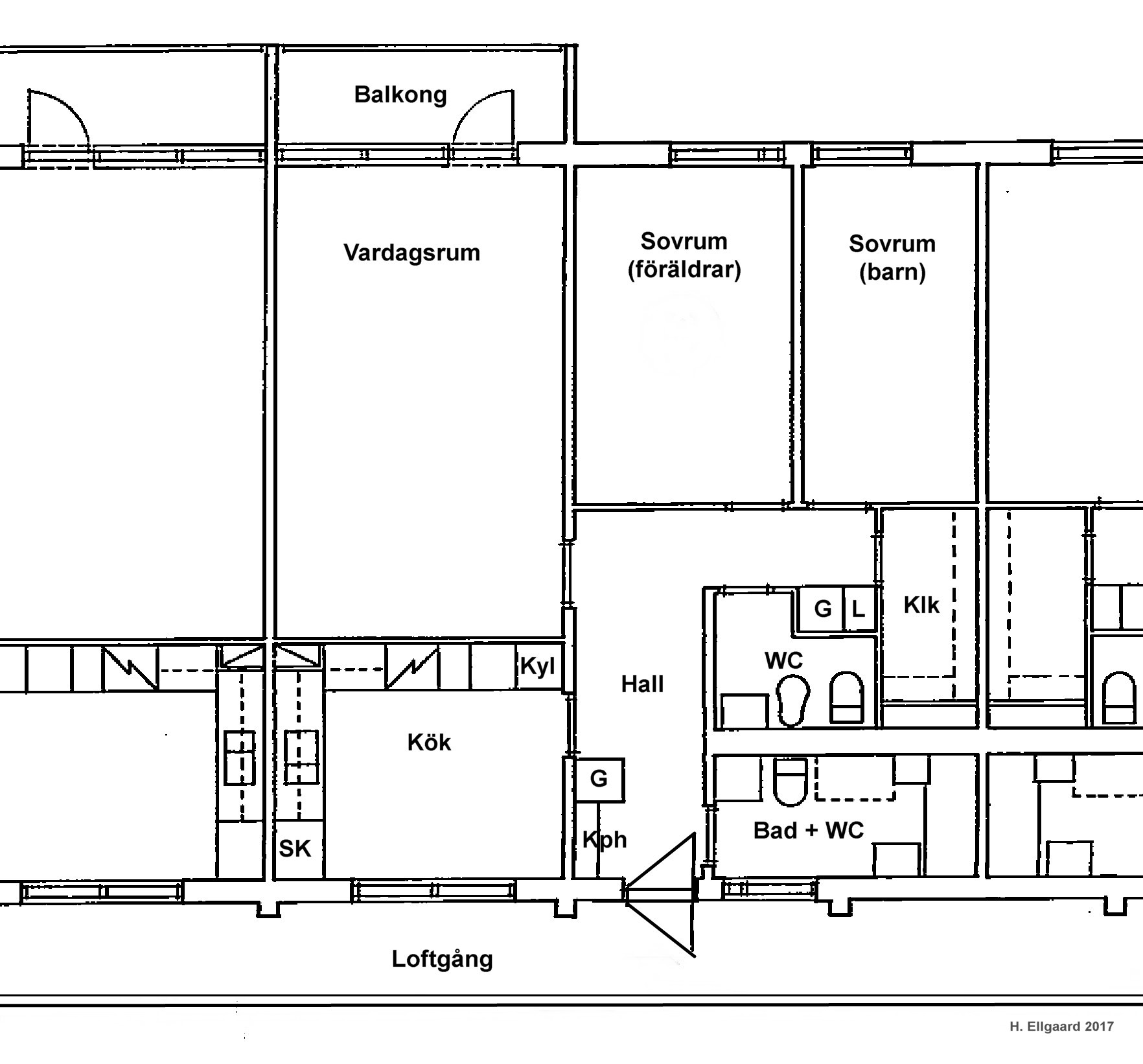 Lägenhet om 3 rum och kök, ca 72 kvadratmeter (exempelvis Kämpingebacken 13)